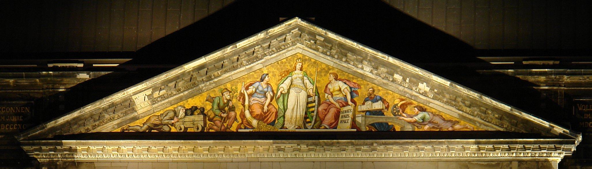 Saxonia-Darstellung auf dem Giebelfeld am sächsischen Finanzministerium in Dresden.